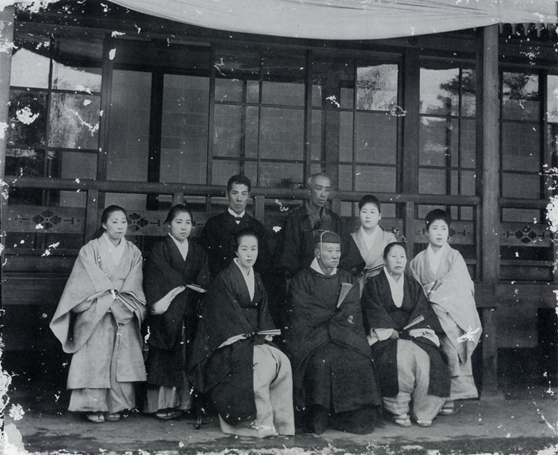 楫取素彦・美和子ら 杉家寄贈の写真 前列(着座)中央が素彦・向かって右隣が美和子